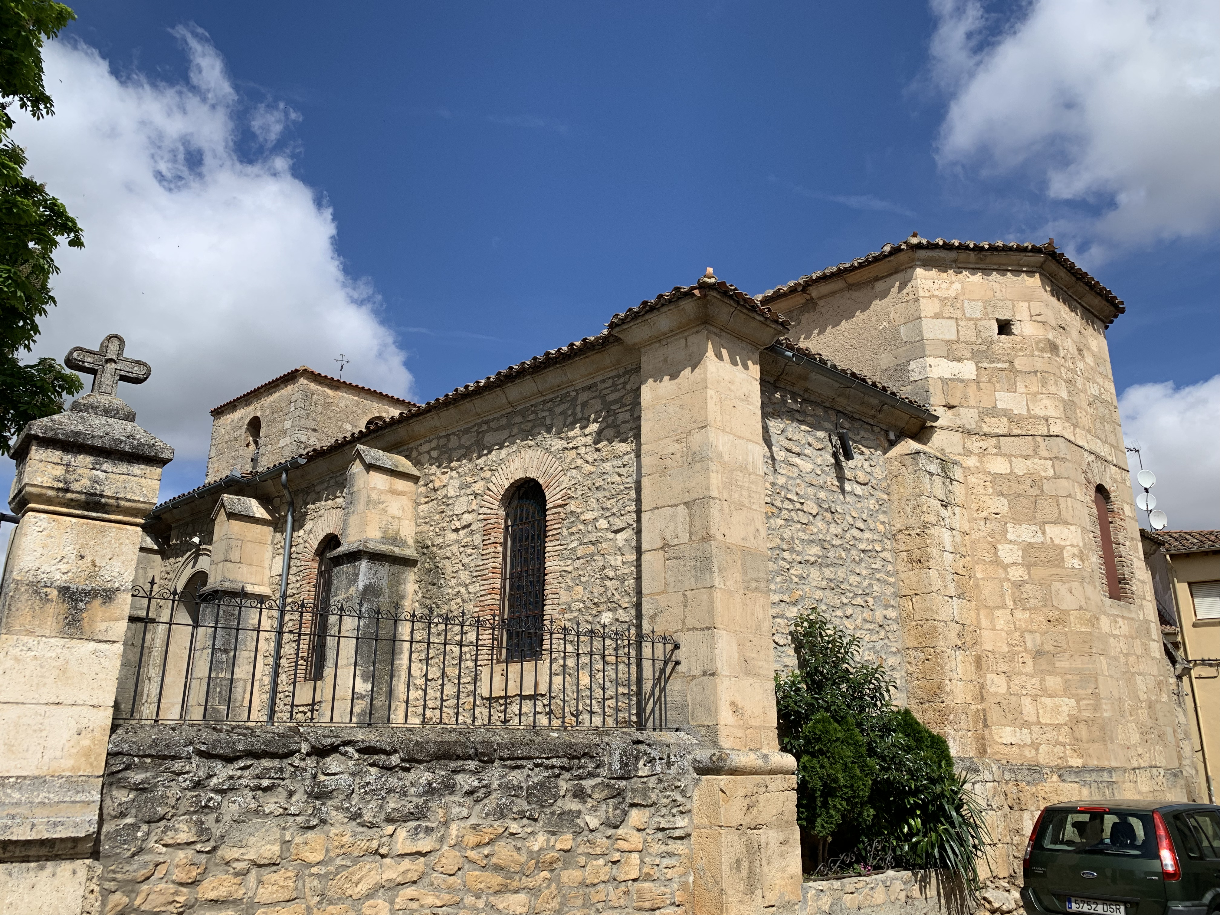 Iglesia de San Mamés. Villanueva de Gumiel.